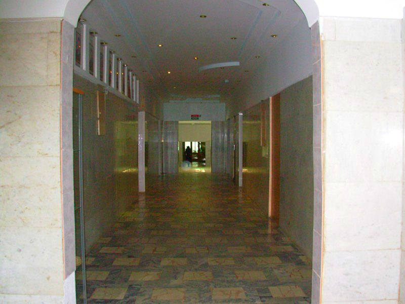 ptu72